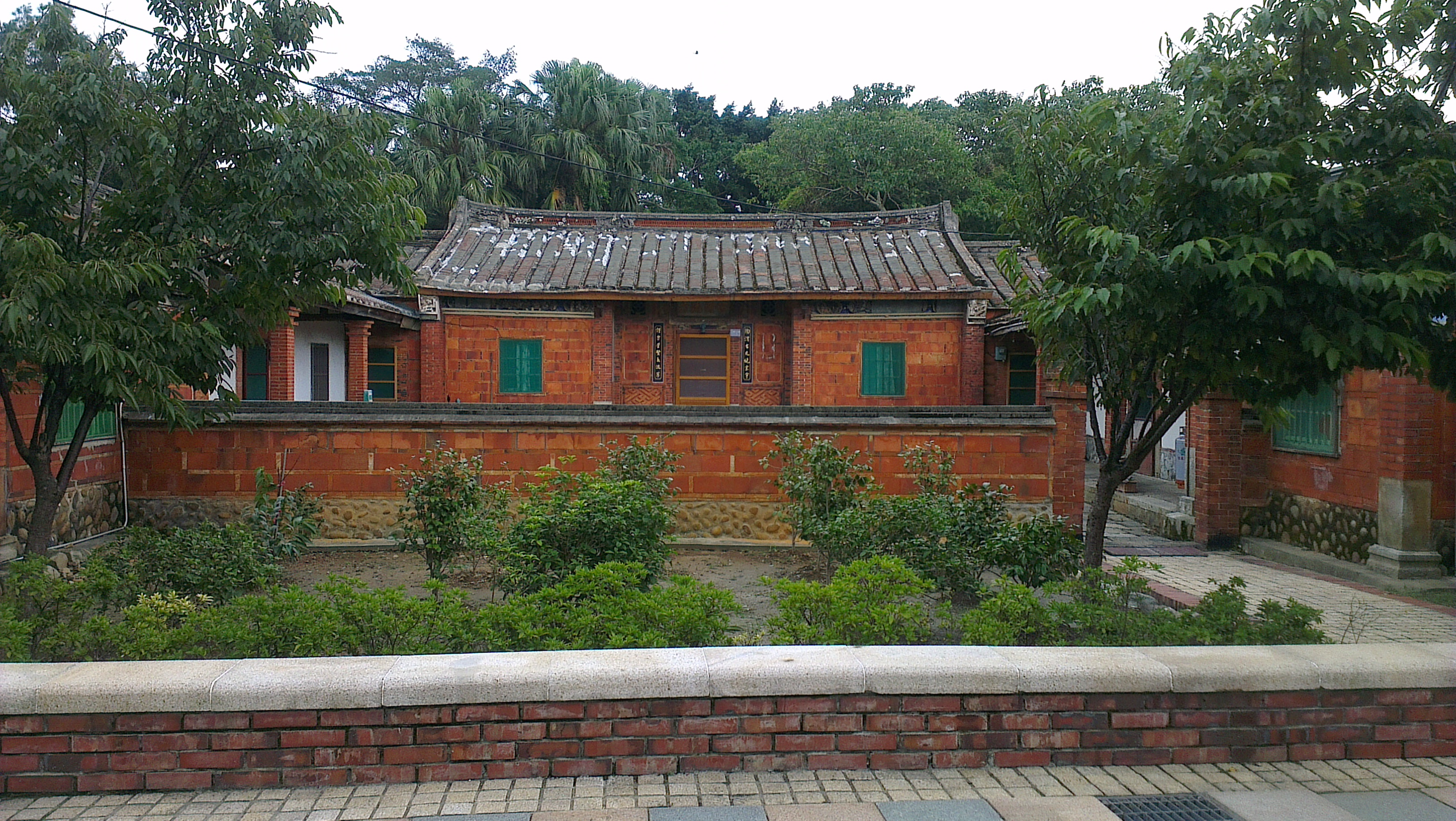 新屋范姜祖堂第3棟